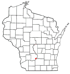 SAC PREARIE DU SAC